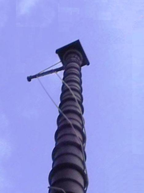 പട്ടണകാട് - കൊടിമരം